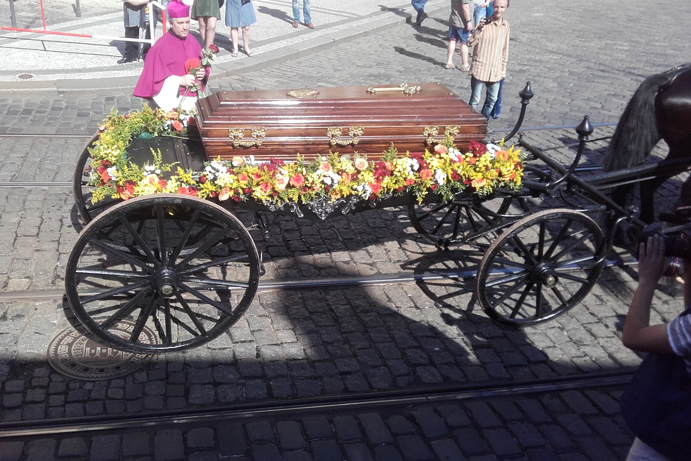 Převoz ostatků kardinála Berana do Prahy